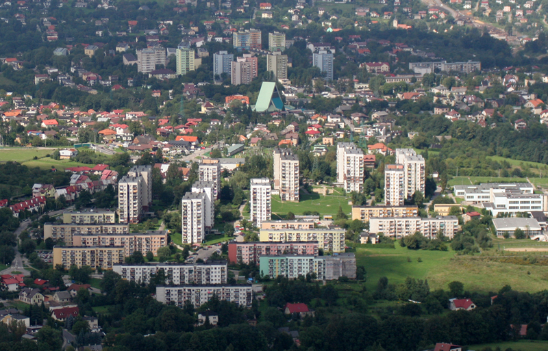 Aleksandrowice (dzielnica Bielska-Białej)